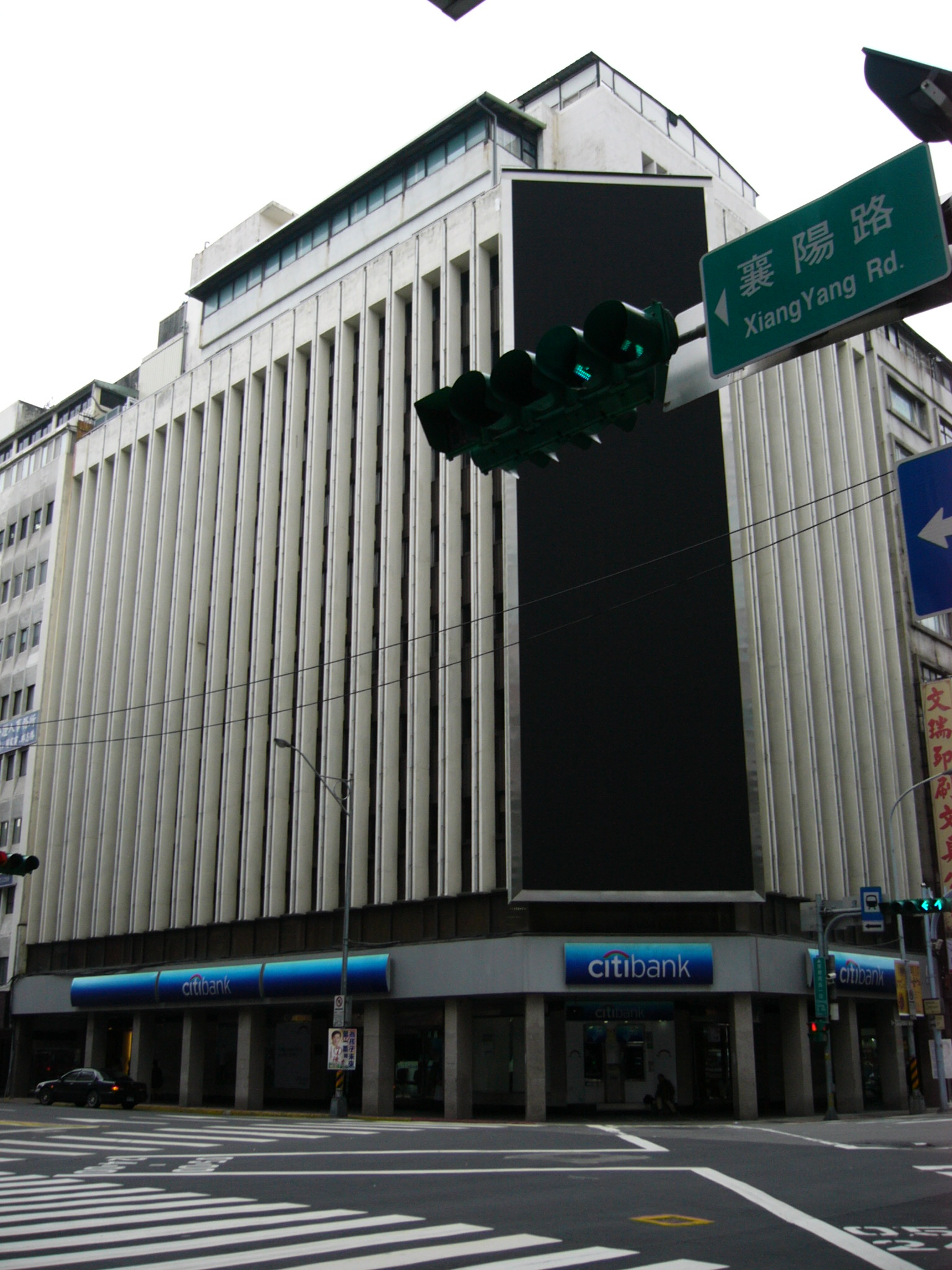 花旗（台灣）商業銀行襄陽分行，位於臺北市中正區襄陽路8號，即原華僑商業銀行總行。